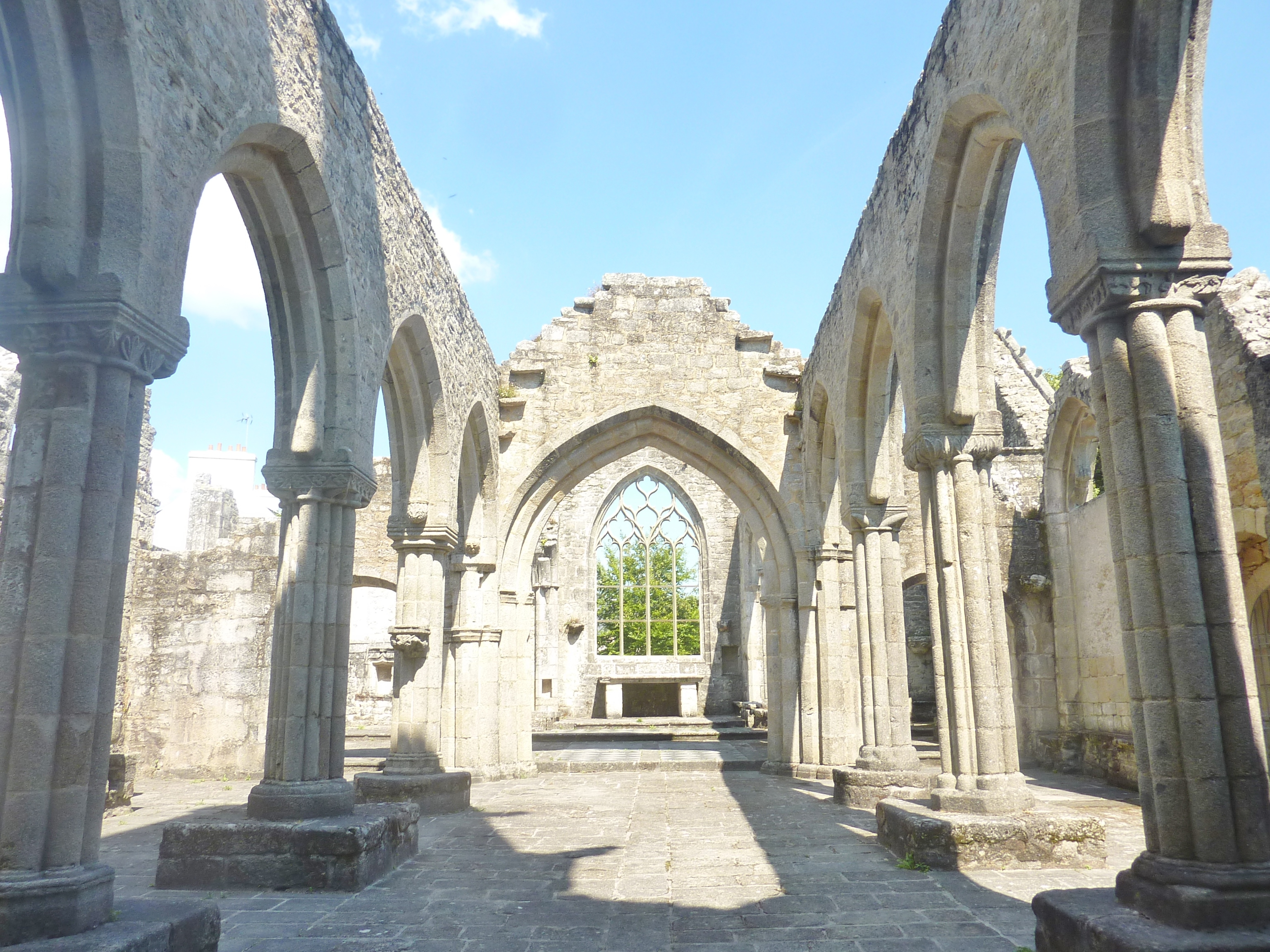 Eglise Saint-Jacques de Lambour, nef de l'ancienne église tréviale